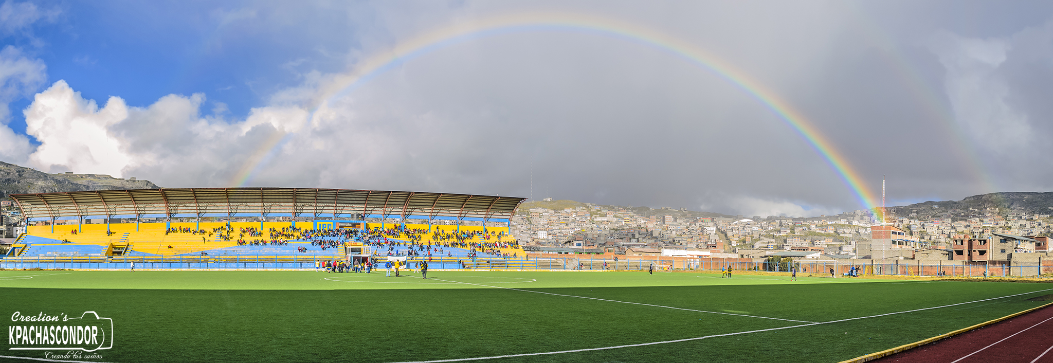 Estadio Daniel Alcides Carrión de Cerro de Pasco, ubicado a más de 4380 m.s.n.m.